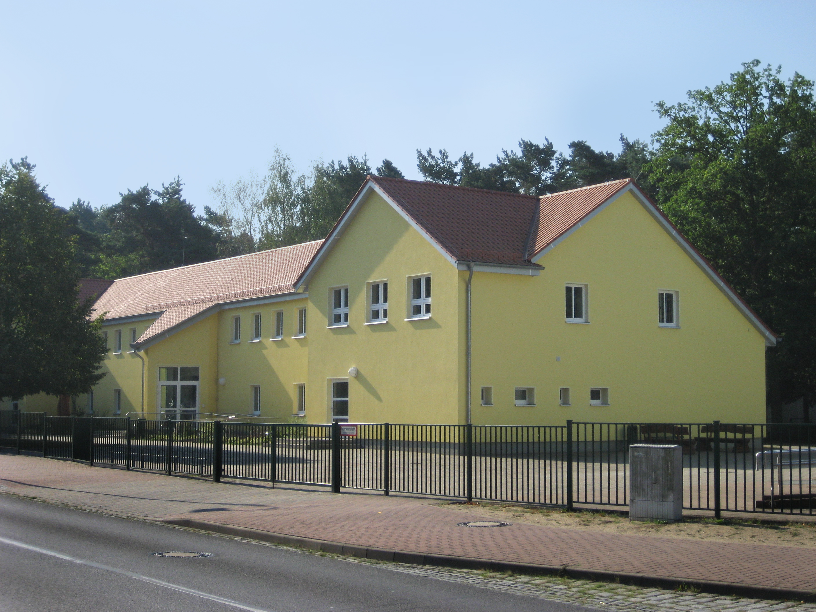 Ein Teilgebäude der Europaschule Deutsch-Polnisches Gymnasium Löcknitz (EDPG Löcknitz).